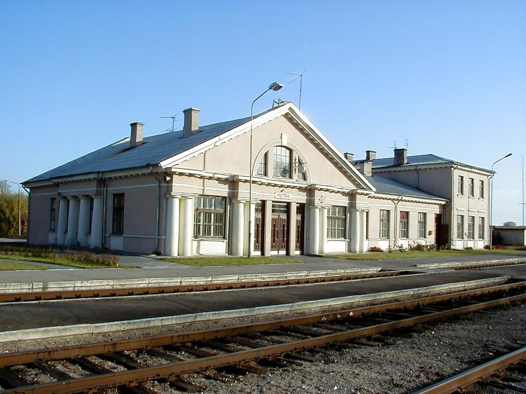 Meitenes stacija Elejā 2000-10-06